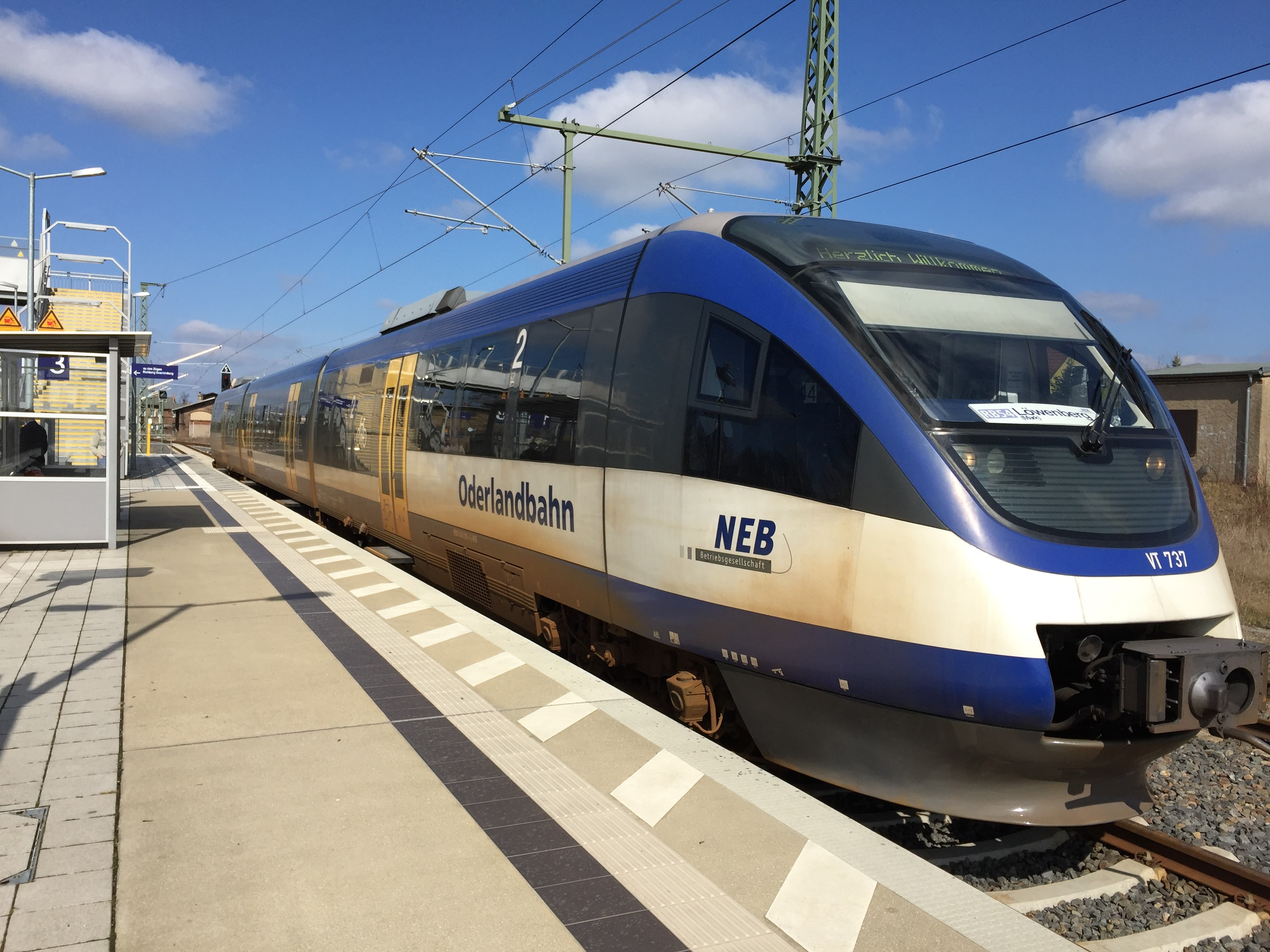 Talent-Triebwagen der Niederbarnimer Eisenbahn] im Bahnhof Löwenberg (Mark)